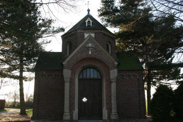 Denkmal Nr. 111 in Viersen-Boisheim